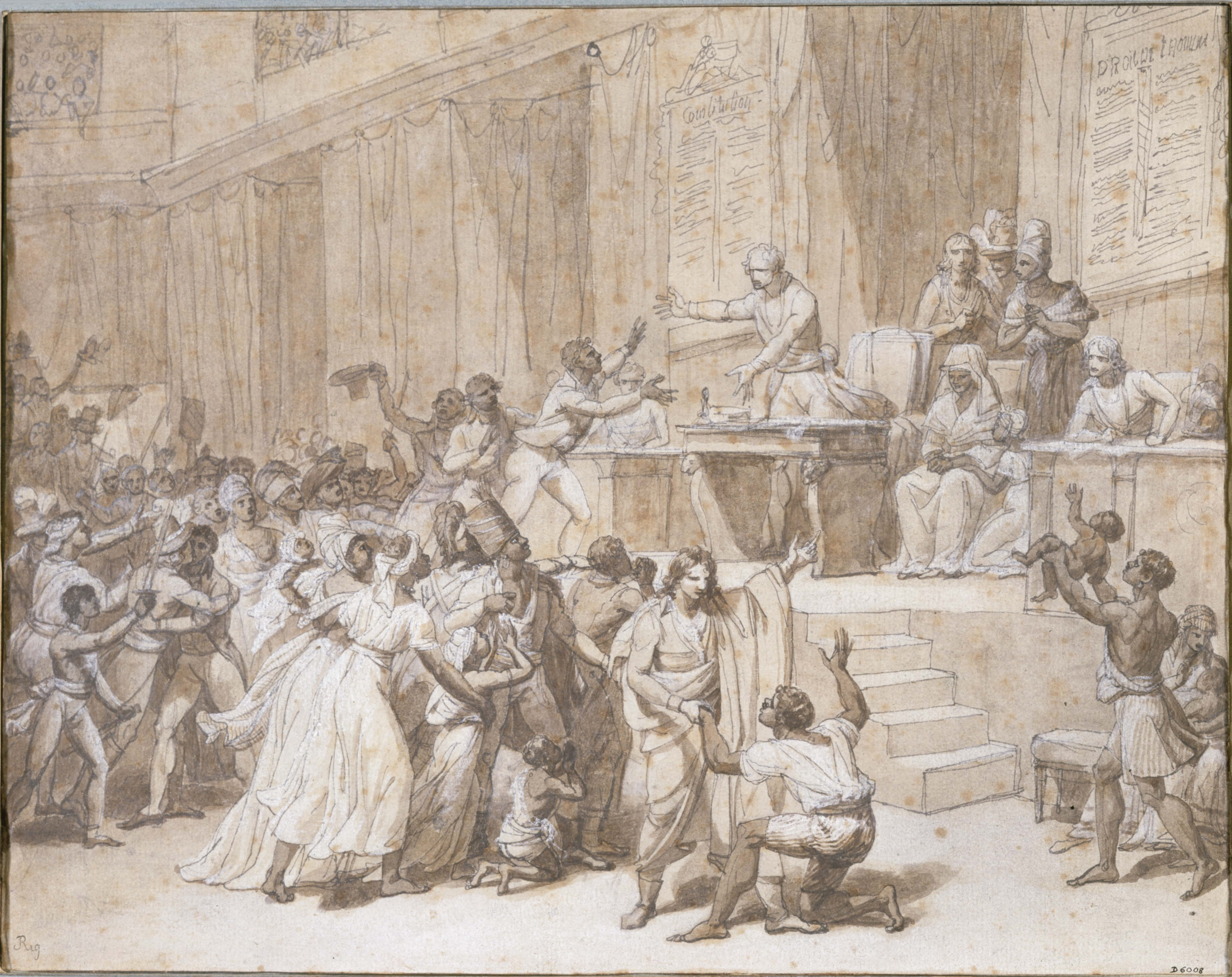 L'insurrection des esclaves de Saint-Domingue se prolonge à Paris. Les Hommes de couleur libres entrent dans la Convention et demandent l'abolition de l'esclavage dans l'empire colonial d'Ancien Régime. On voit Jeanne Odo à la tribune avec une jeune fille (Réf. Périssent les colonies plutôt qu'un principe, 13 novembre - décembre 1998, campus de Jussieu)